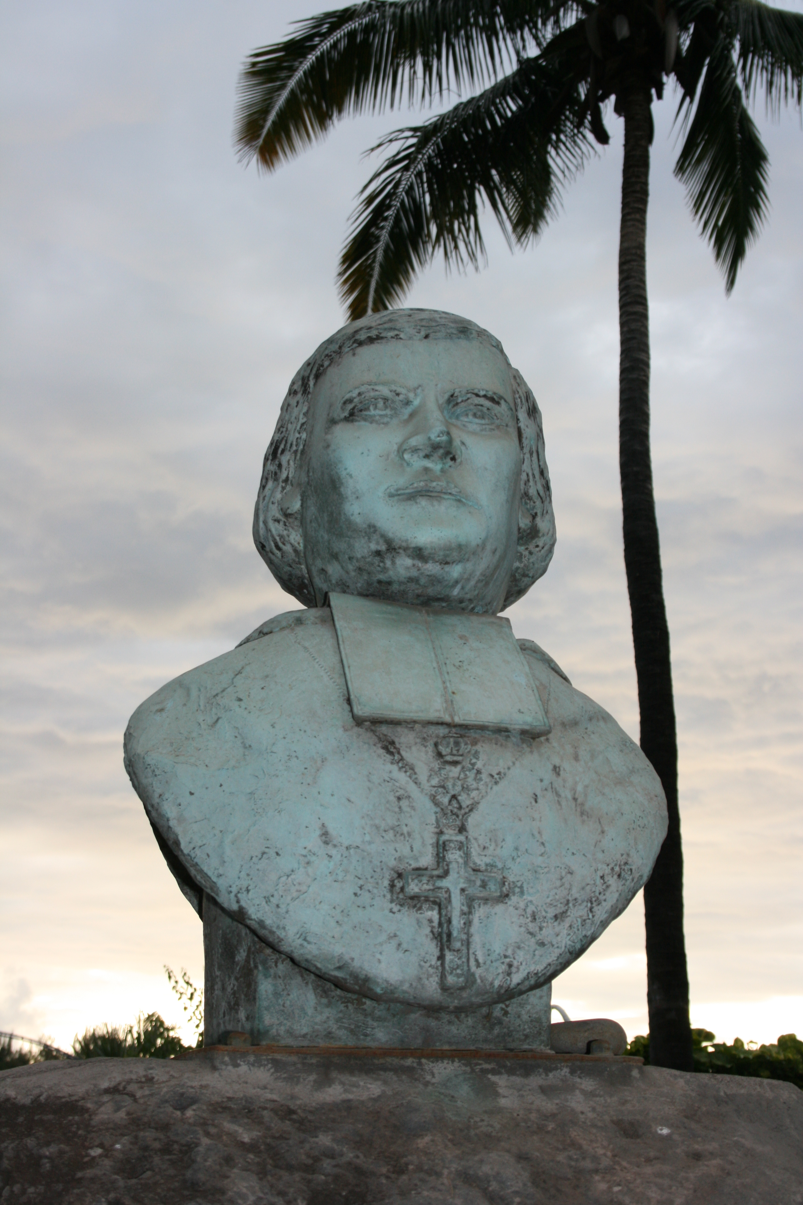 Buste d'Alexandre Monnet à l'entrée du cimetière marin de Saint-Paul, à Saint-Paul de La Réunion.